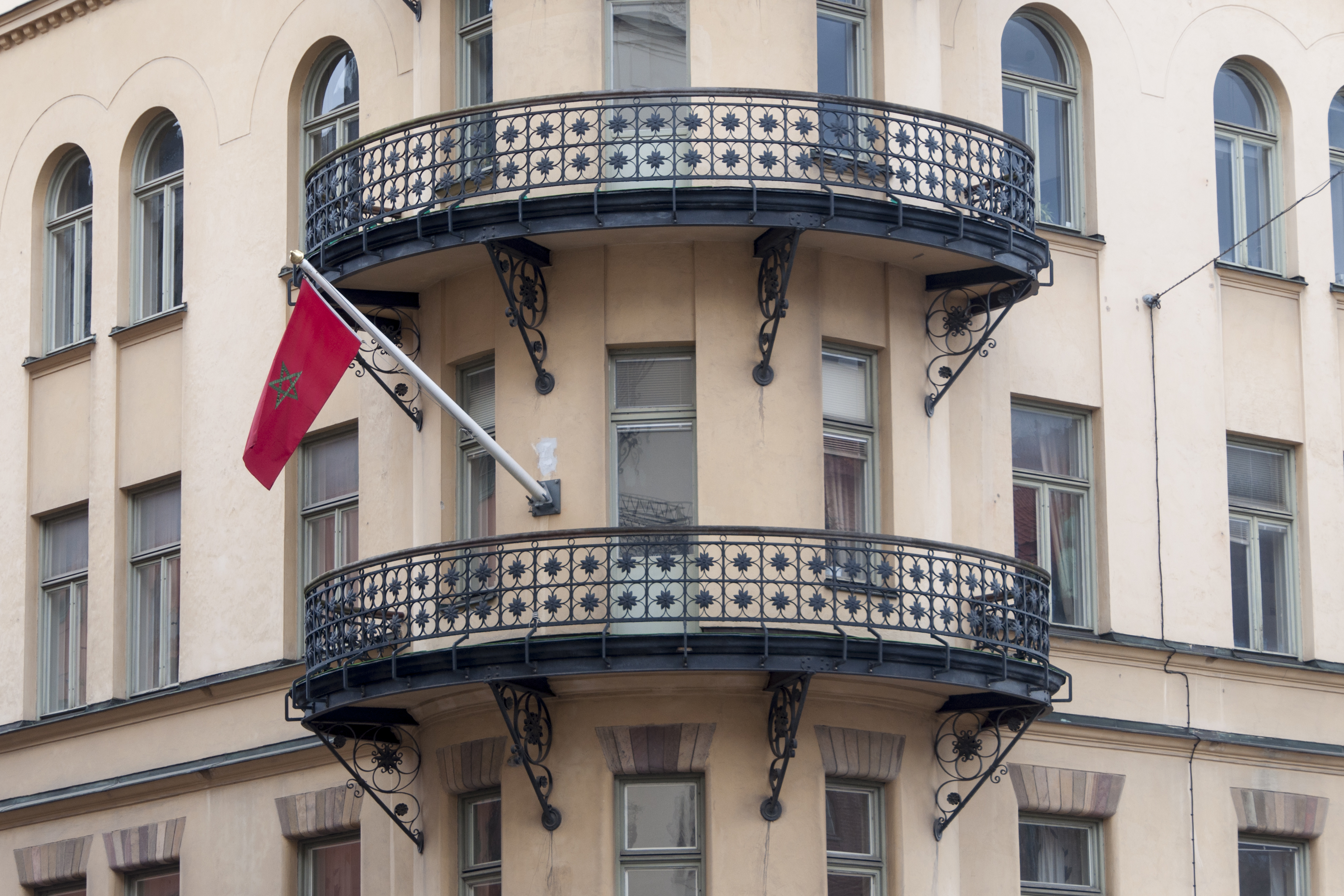 Marockanska ambassaden i Stockholm, Kungsholmstorg 16 Nybyggnadsår 1898 - 1899 Anders Pettersson (Byggmästare) Dorph & Höög (Arkitekt) Isaac Hirsch (Byggherre) L. Olsson (Arkitekt) W. Larsson (Byggherre)